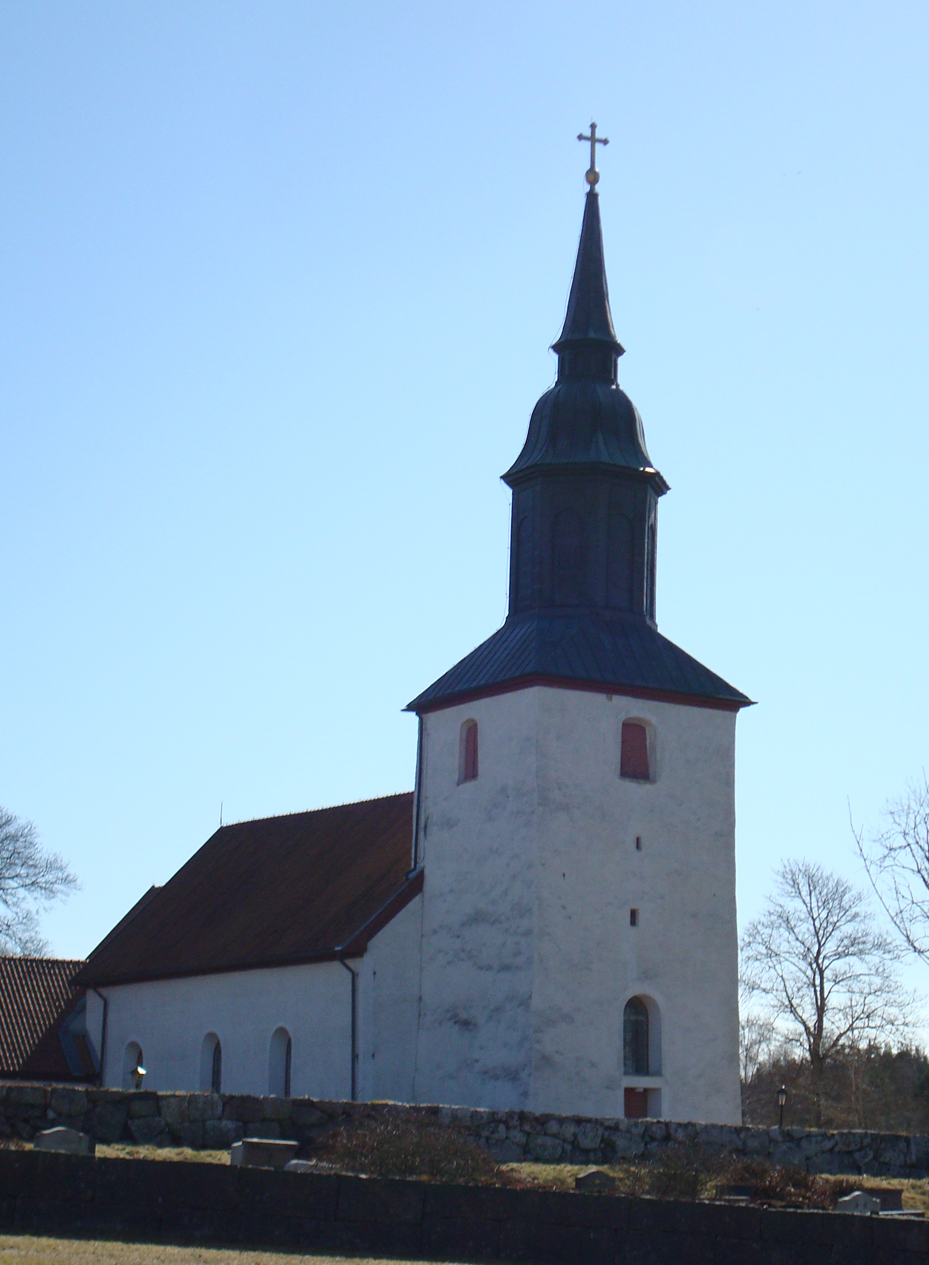 Kyrkan i Lekeryd